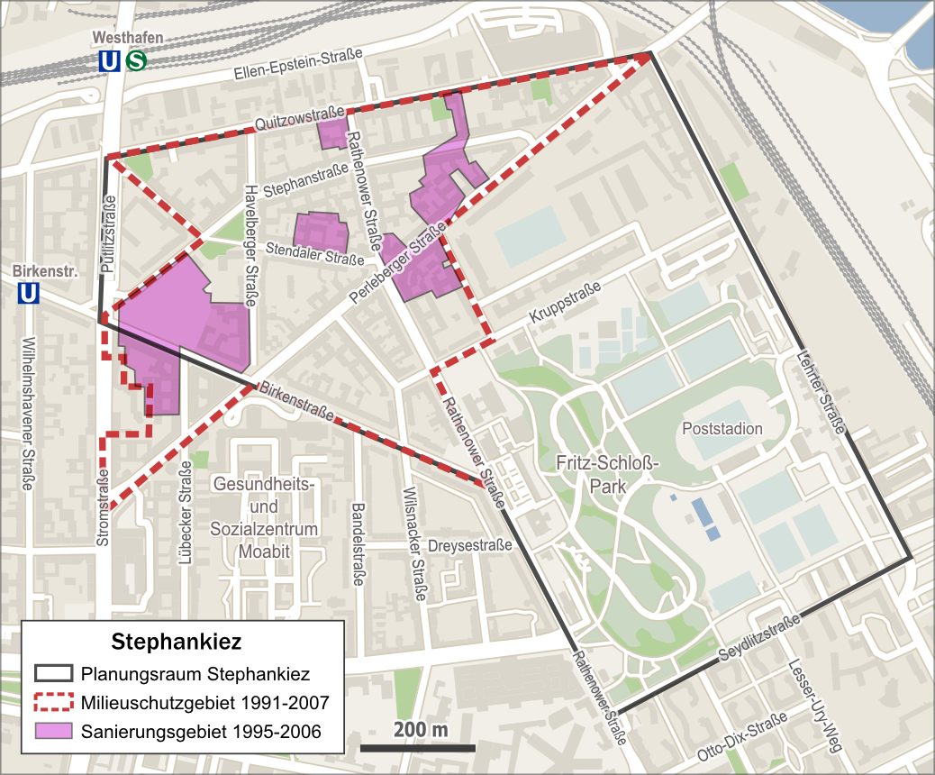 Karte Stephankiez in Berlin-Moabit